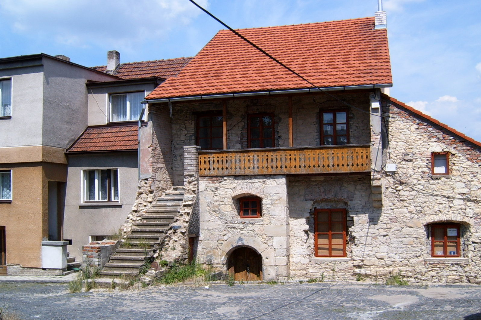 Buštěhrad, fragmenty tzv. Starého paláce